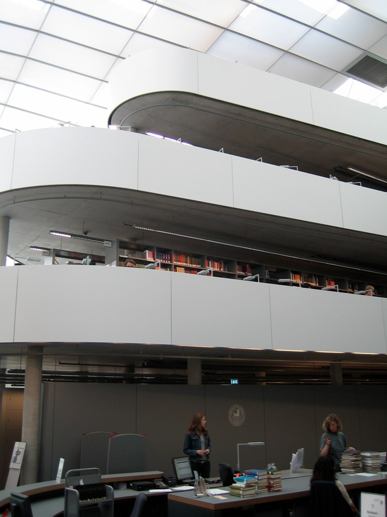 Philologische Bibliothek der FU Berlin